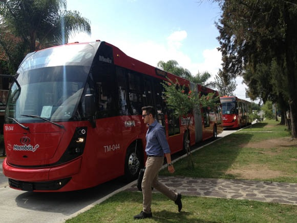 Nuevas unidades del Macrobús